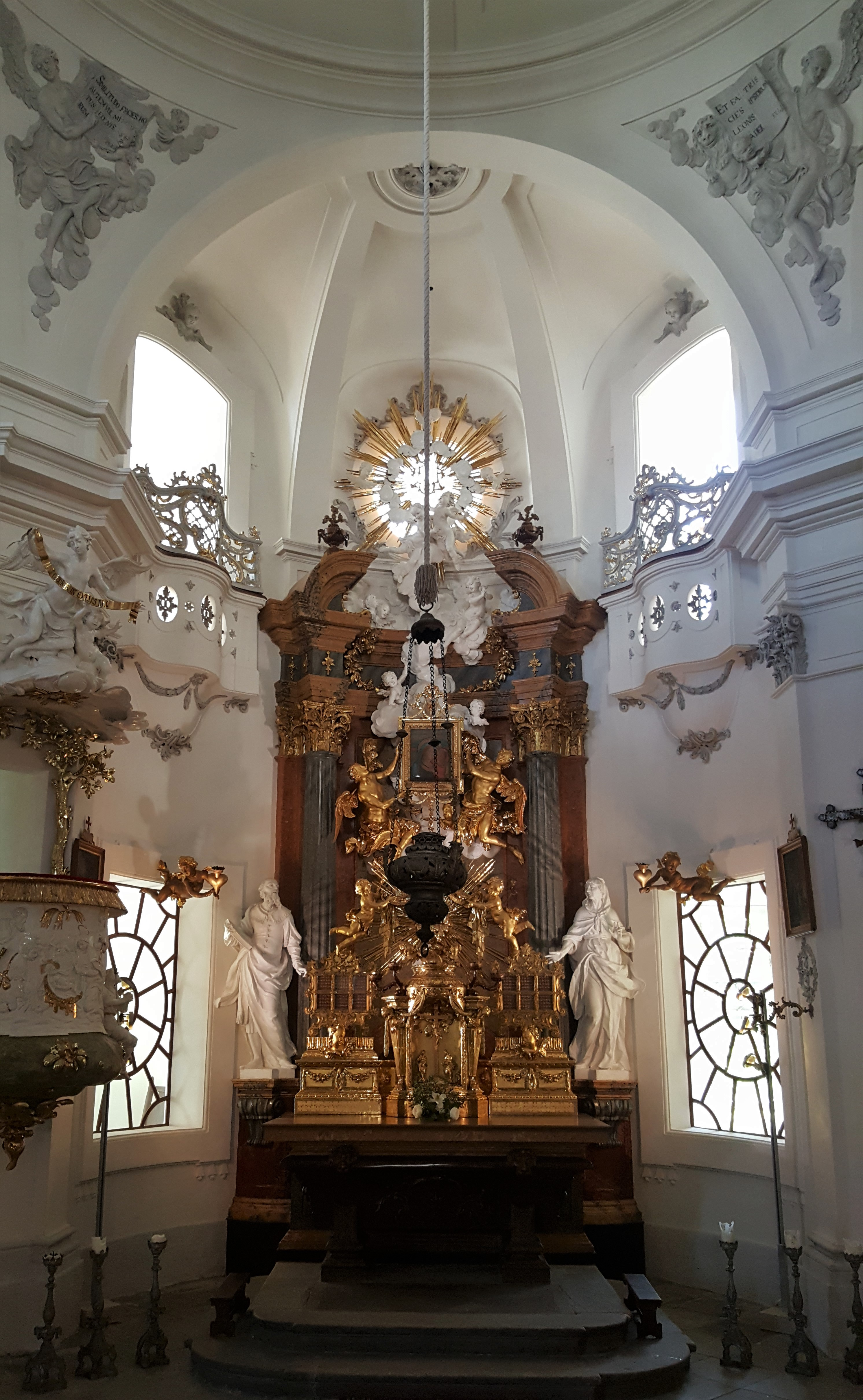 Interiér zámecké kaple ve Vizovicích - autor výzdoby z let 1774–1777 je brněnský sochař Ondřej Schweigl (1735-1812)